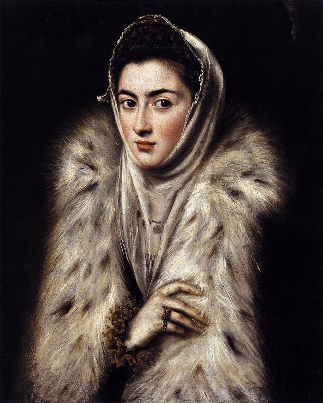 La dama del armiño o La Infanta Catalina Micaela con abrigo de piel, atribuido al Greco